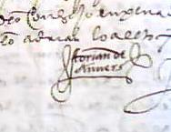 Firma de Adrián de Amberes